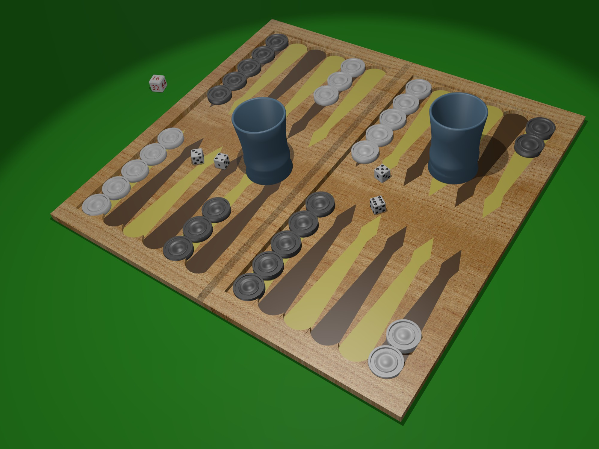 Короткие нарды